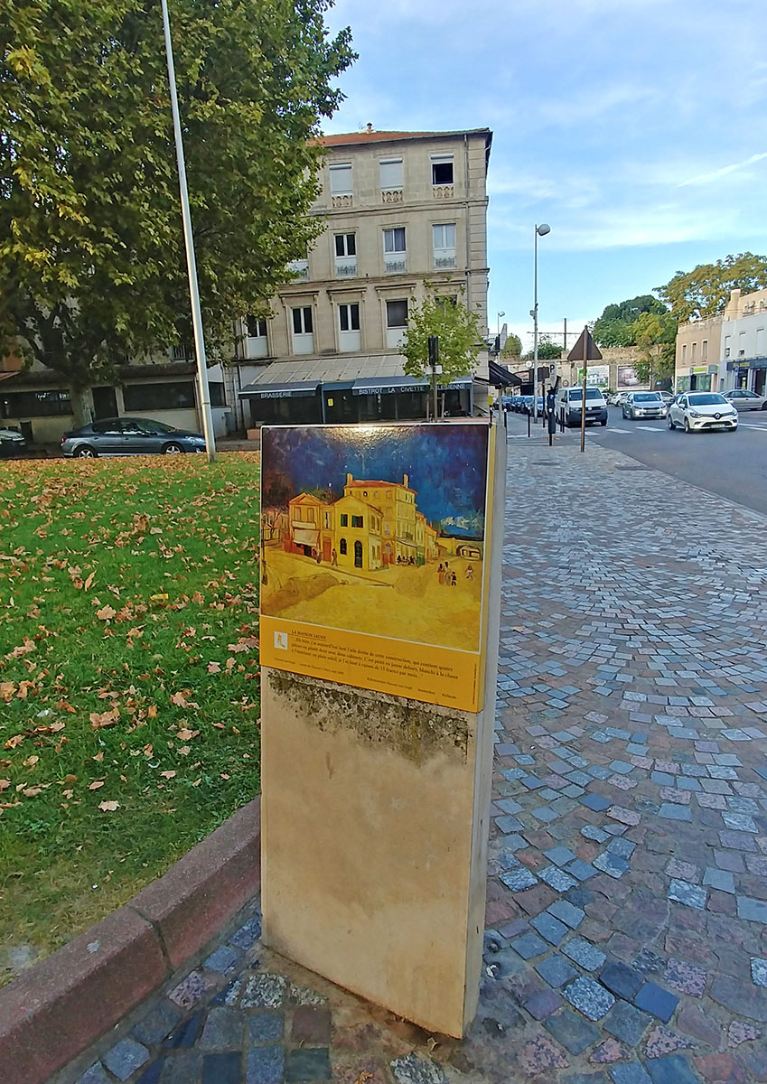 Antigua ubicacion de la casa en Arles que van Gogh pintó en su "Casa Amarilla'.